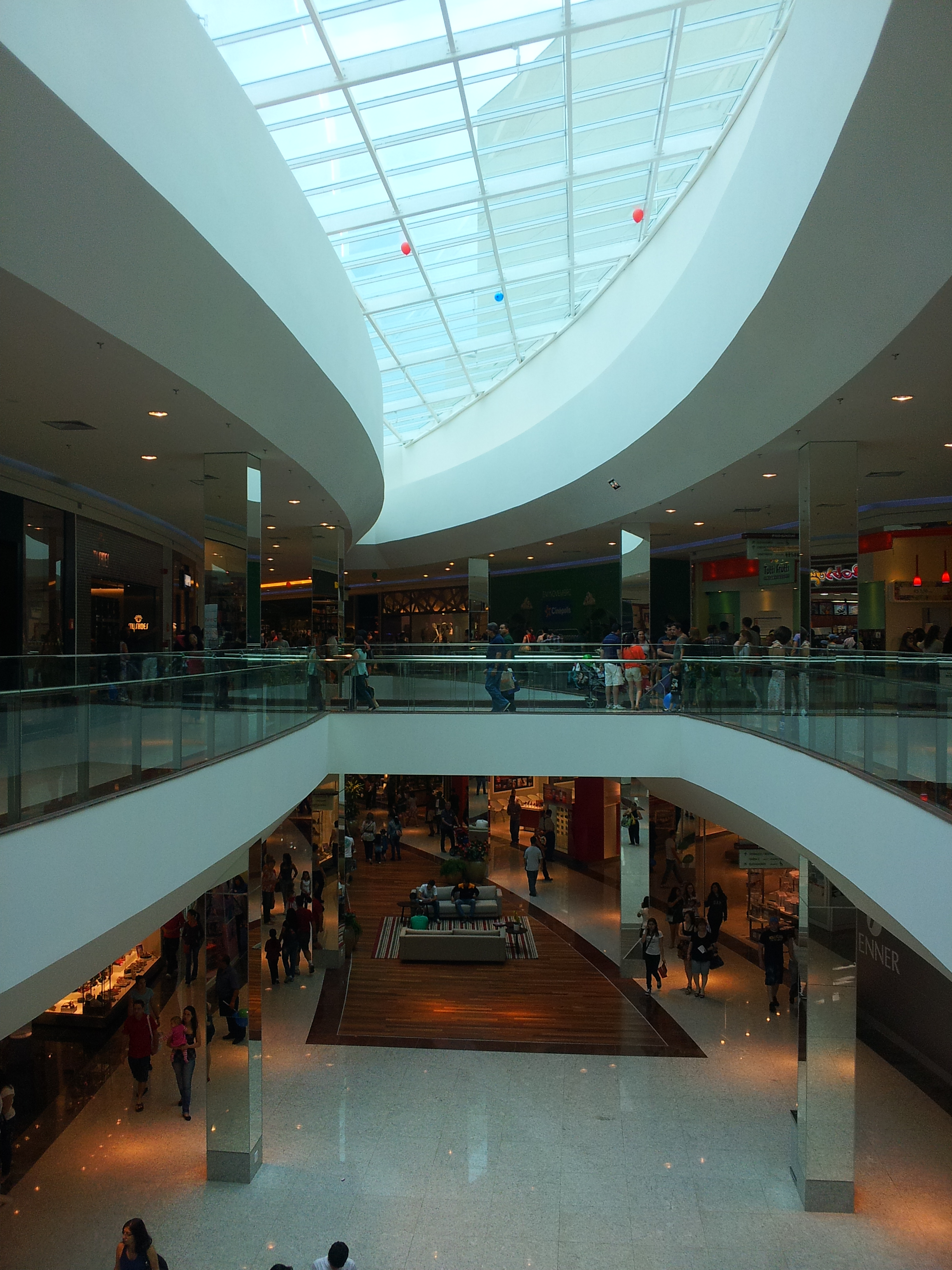 JundiaíShopping_O complexo é um marco no interior do Estado, oferecendo nova infraestrutura de compras, lazer e serviços para moradores e frequentadores da região.